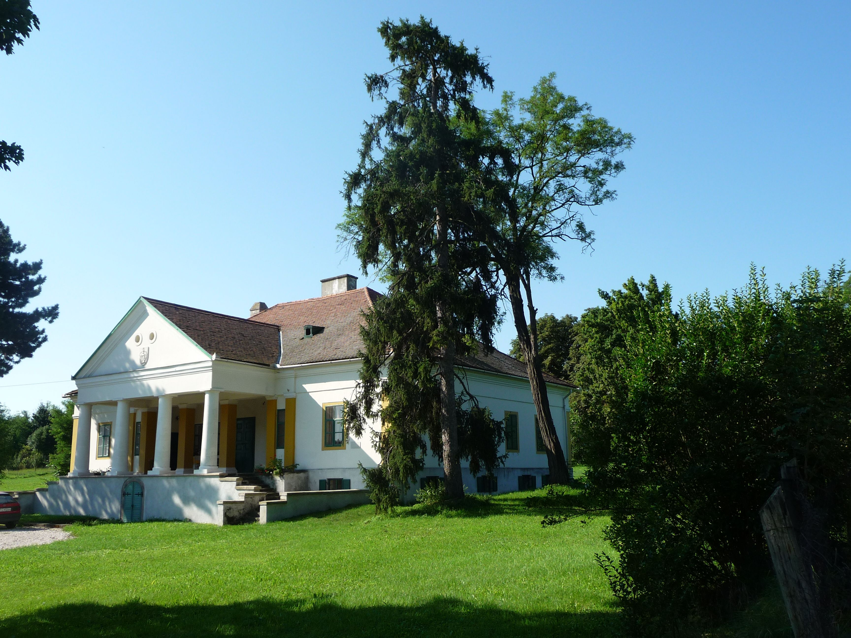 A Végh-kúria Erdőtarcsán